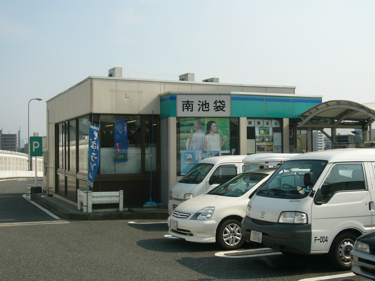 Minami-ikebukuro Parking Area